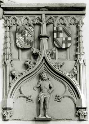 Baufragment einer Sakramentsnische mit Stifterwappen in der ehemaligen Ortskirche St. Katharina von Treis-Karden a.d.Mosel